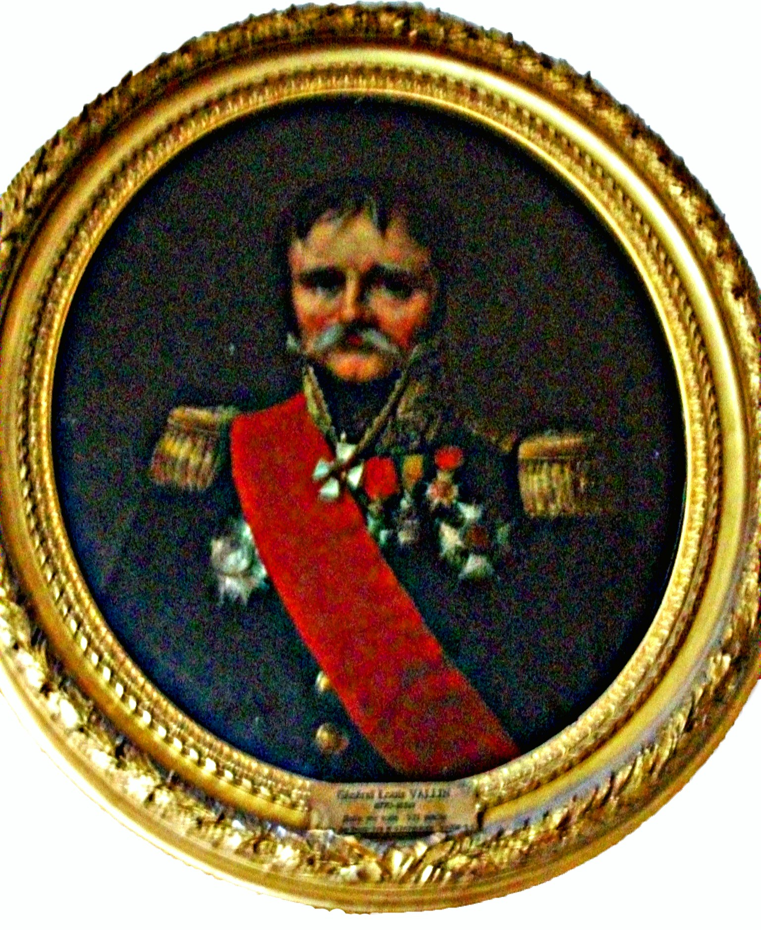 Portrait de Louis Vallin du musée des beaux arts de Châlons, il se trouve à la mairie.